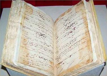 Libro donde se enumeran los nobles a los que se les otorga tierras en Valencia tras su participación en la liberación